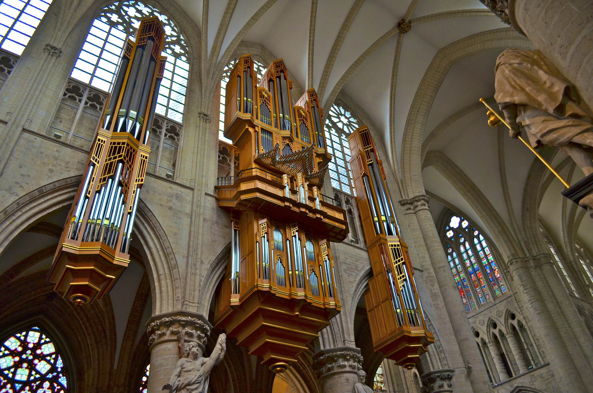 Cathédrale Saint-Michel et Sainte-Gudule de Bruxelles (Belgique), l’orgue de Gerhard Grenzing (El Papiol) (2000)